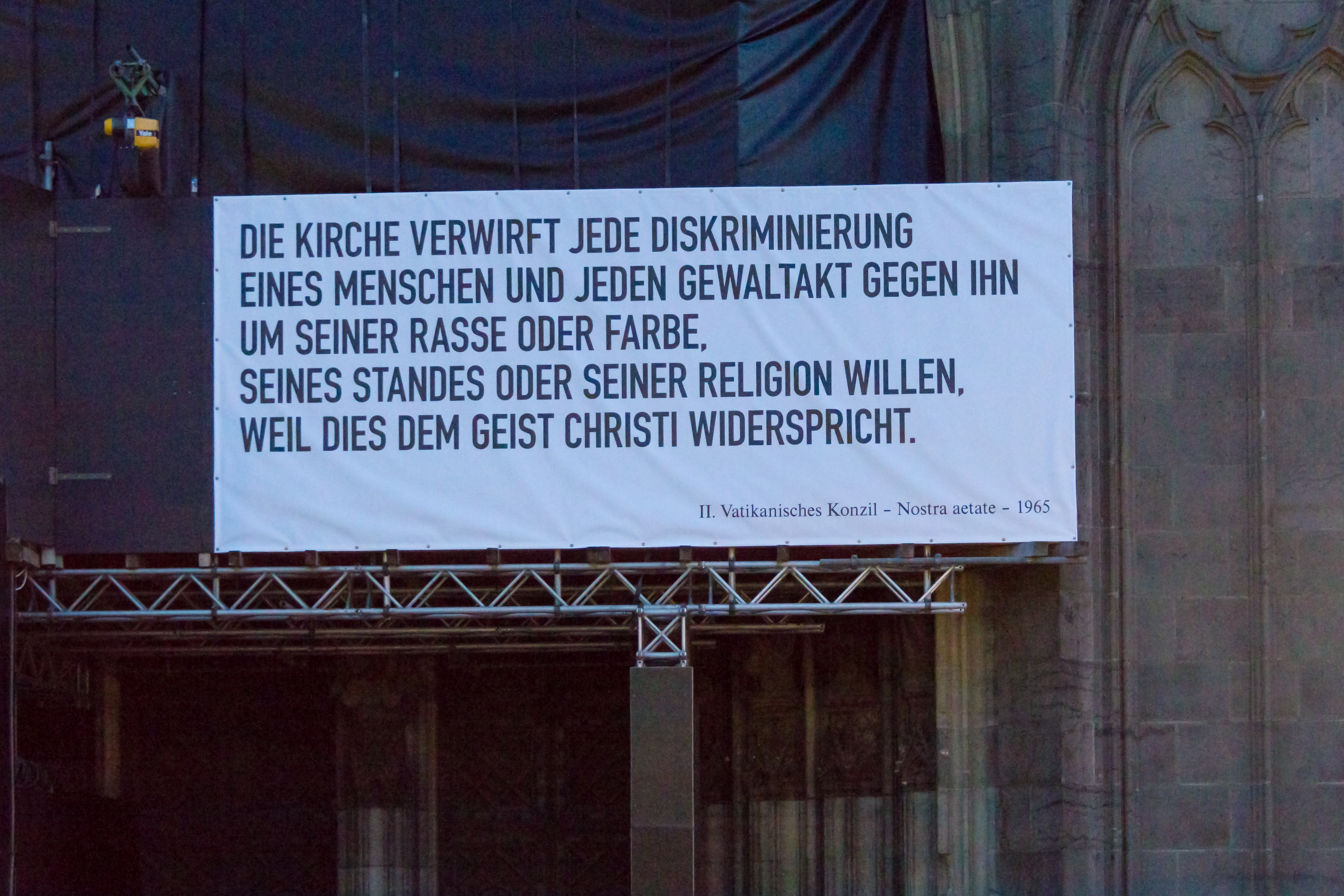 Köln stellt sich quer – nokögida 14. Januar 2015 Foto: Am Nordportal des Kölner Domes hat das Domkapitel ein Banner mit der Audschrift „Die Kirche verwirft jede Diskriminierung eines Menschen und jeden Gewaltakt gegen ihn um seiner Rasse oder Farbe, seines Standes oder seiner Religion willen, weil dies dem Geist Christi widerspricht. II. Vatikanisches Konzil, Nostra aetate - 1965“